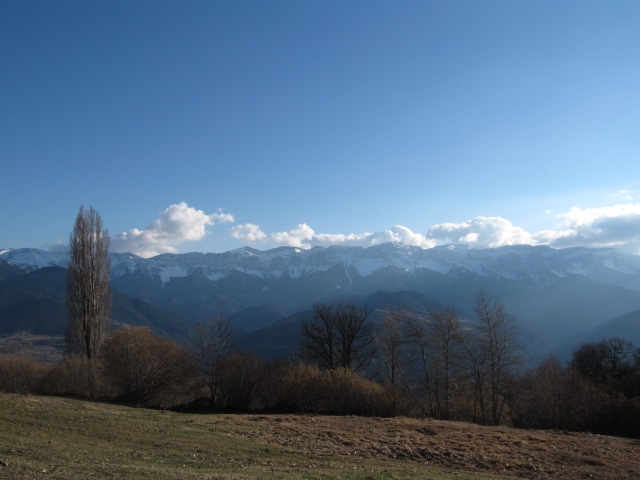 La Serra del Cadí vista des de Lles de Cerdanya (Baixa Cerdanya, Catalunya).